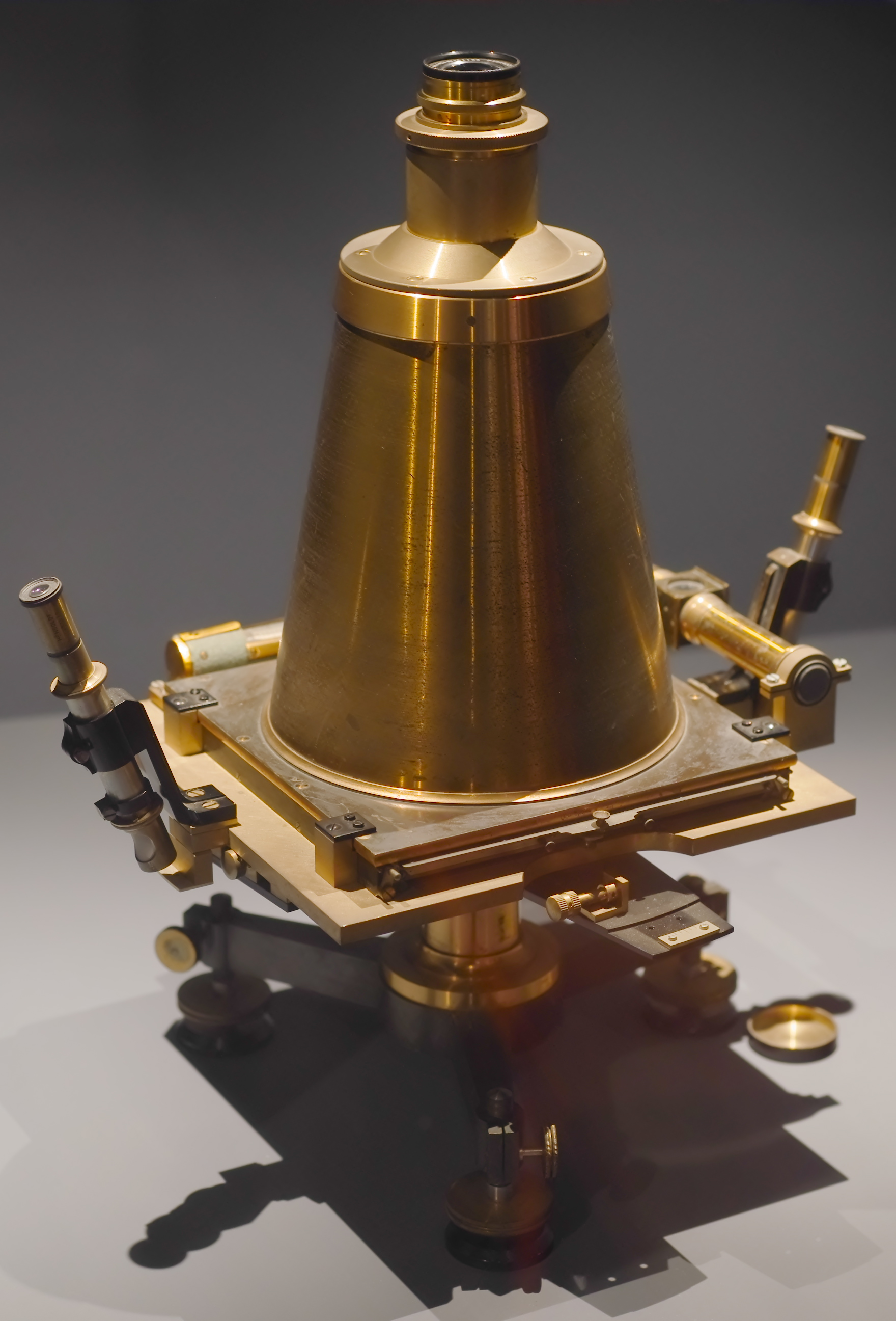 Zenit-Kamera des Herstellers Max Fechner in Potsdam (um 1900), Exponat der Ausstellung 2017 vom GeoForschungsZentrum Potsdam